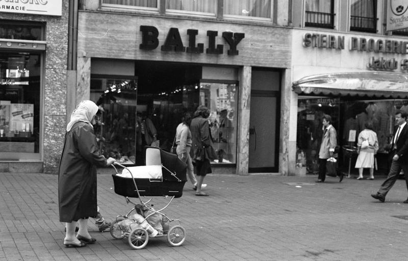 Juni 1988 Bonn - Läden in der Sternstraße